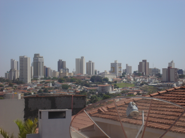 Marília's skyline, São Paulo, Brazil - Panorama de Marília, São Paulo, Brasil